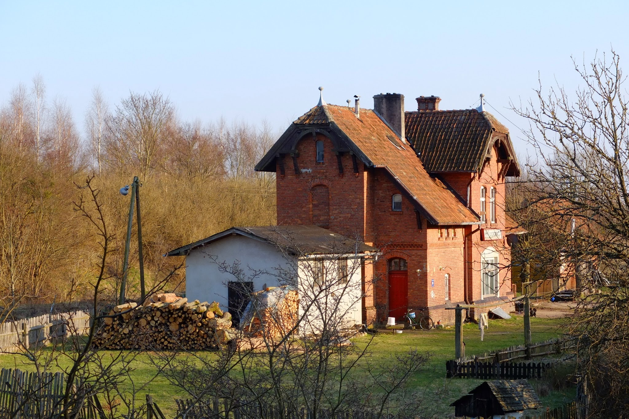 Ochódno - budynek dworca kolejowego z 1909 r. przy rozebranej lini kolejowej.